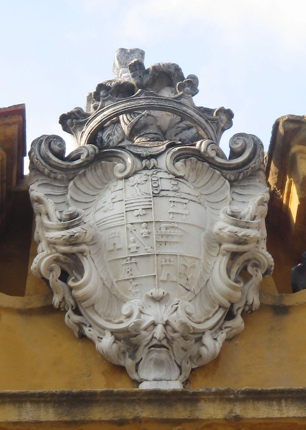 Escudo de la Casa de Arizón, Sanlúcar de Barrameda-Cádiz-Andalucía-España